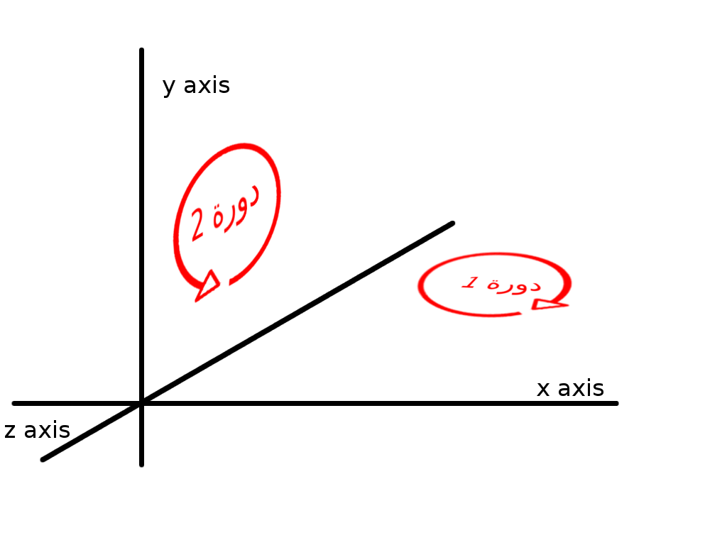 توضيح لعملية دوران المكعب